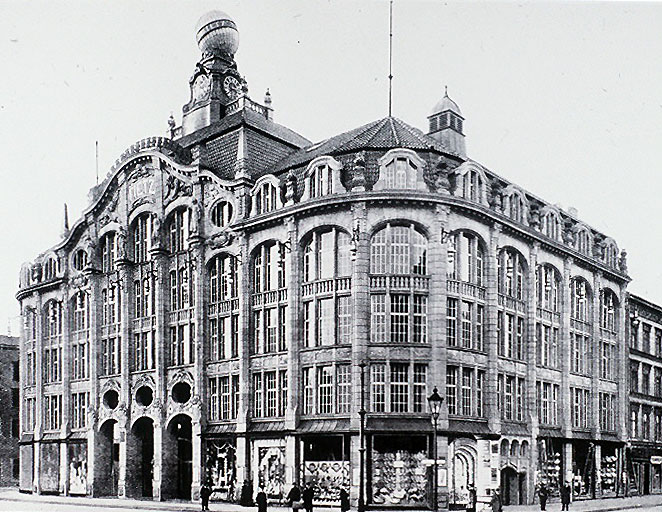 Warenhaus Hermann Tietz am Alexanderplatz in Berlin-Mitte; erster Bauabschnitt, 1904-1905 von den Architekten Wilhelm Cremer und Richard Wolffenstein